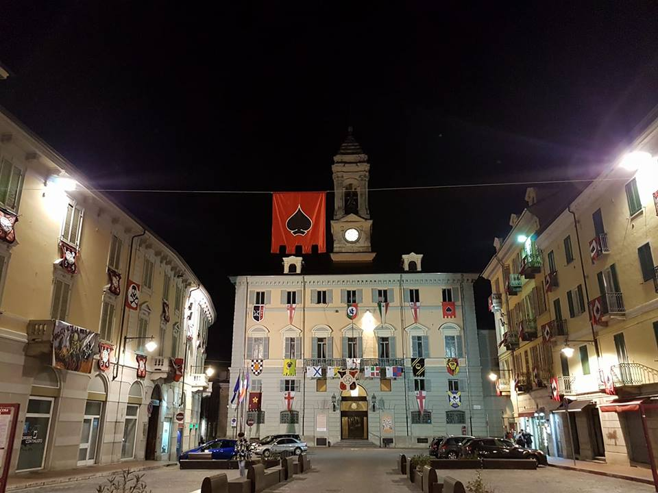 Gonfaloni dei gruppi storici in Piazza Ferruccio Nazionale e sul Palazzo civico in occasione dello Storico carnevale d'Ivrea.